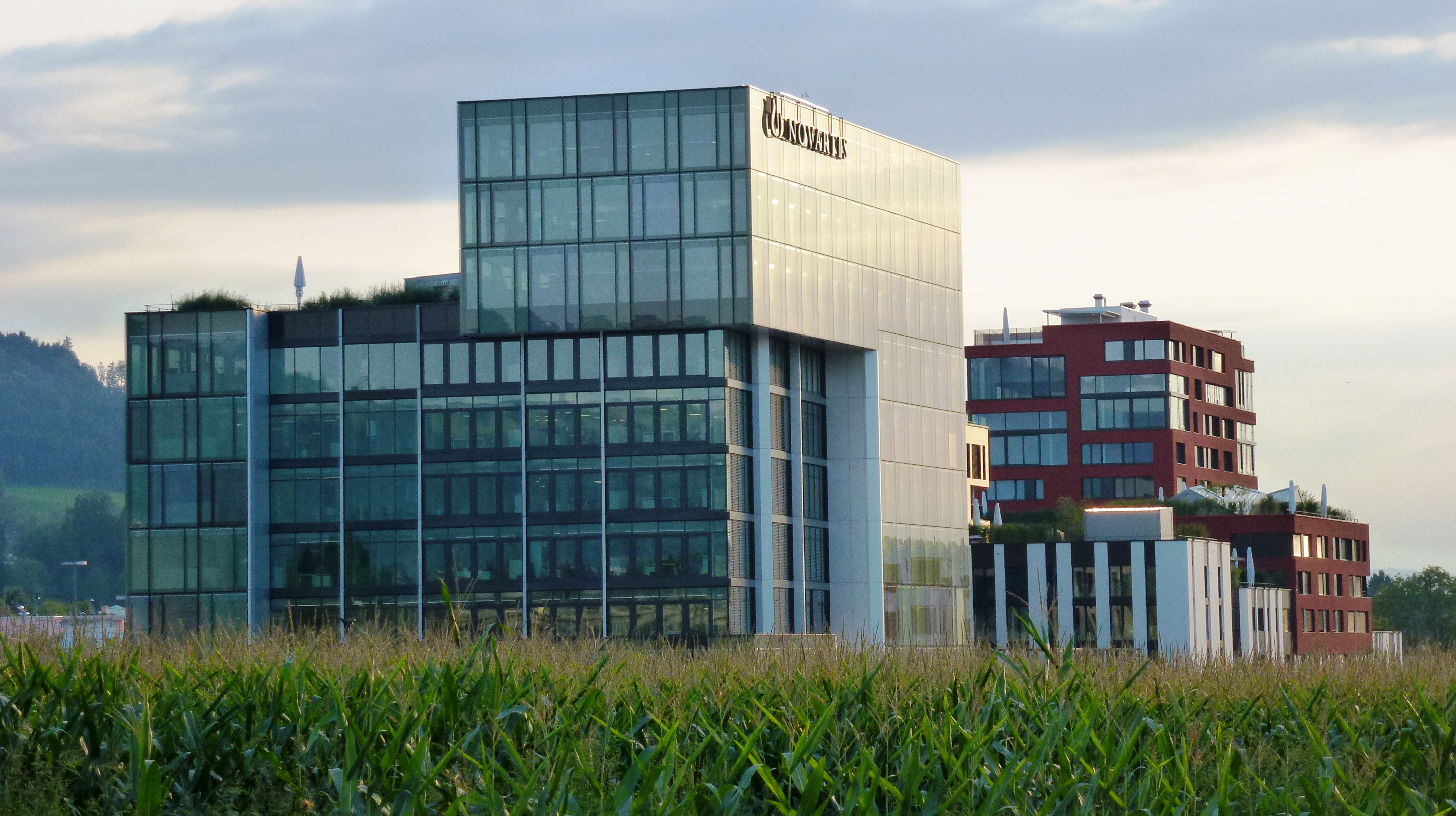 Novartis in der Suurstoffi, Rotkreuz